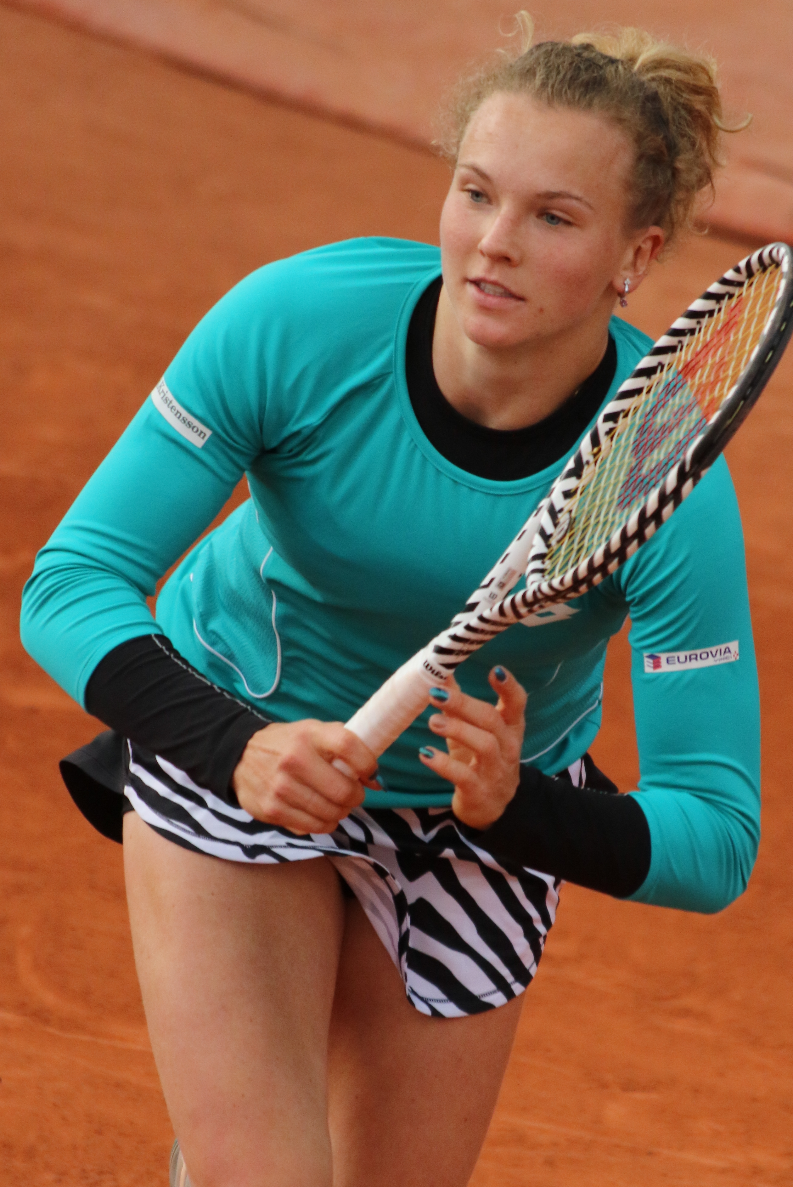 Siniakova RG19 (15)